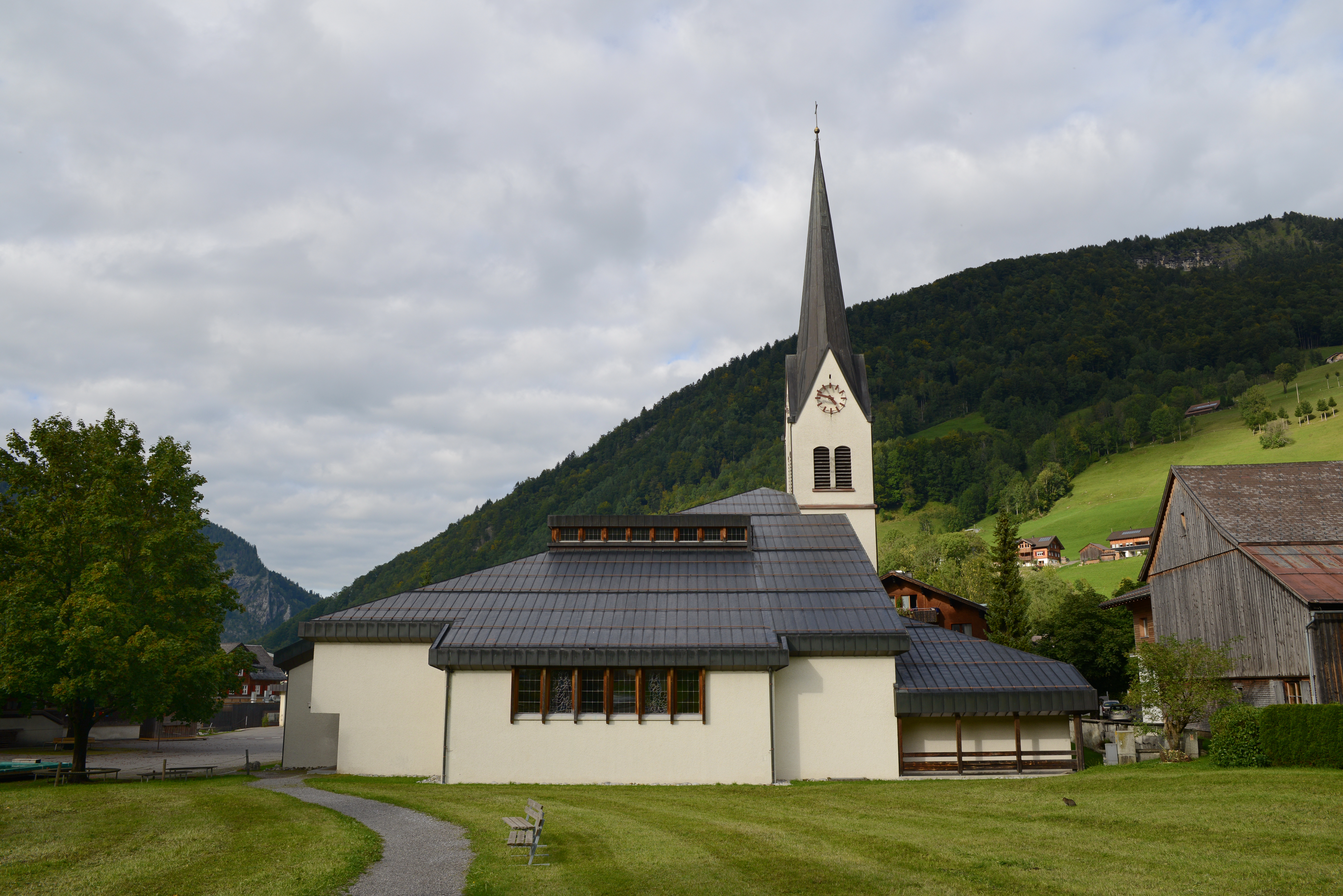 Pfarrkirche Hl. Antonius Eremit in Mellau. Modernerer Betonbau mit älterem Turm mit Giebelspizthelm. 1980-1982 vollständiger Neubau mit Ausnahme des Turmes durch die Architekten Hermann Keckeis und Vonier. Orgel 1876 von Anton Behmann, 1950 umgebaut.